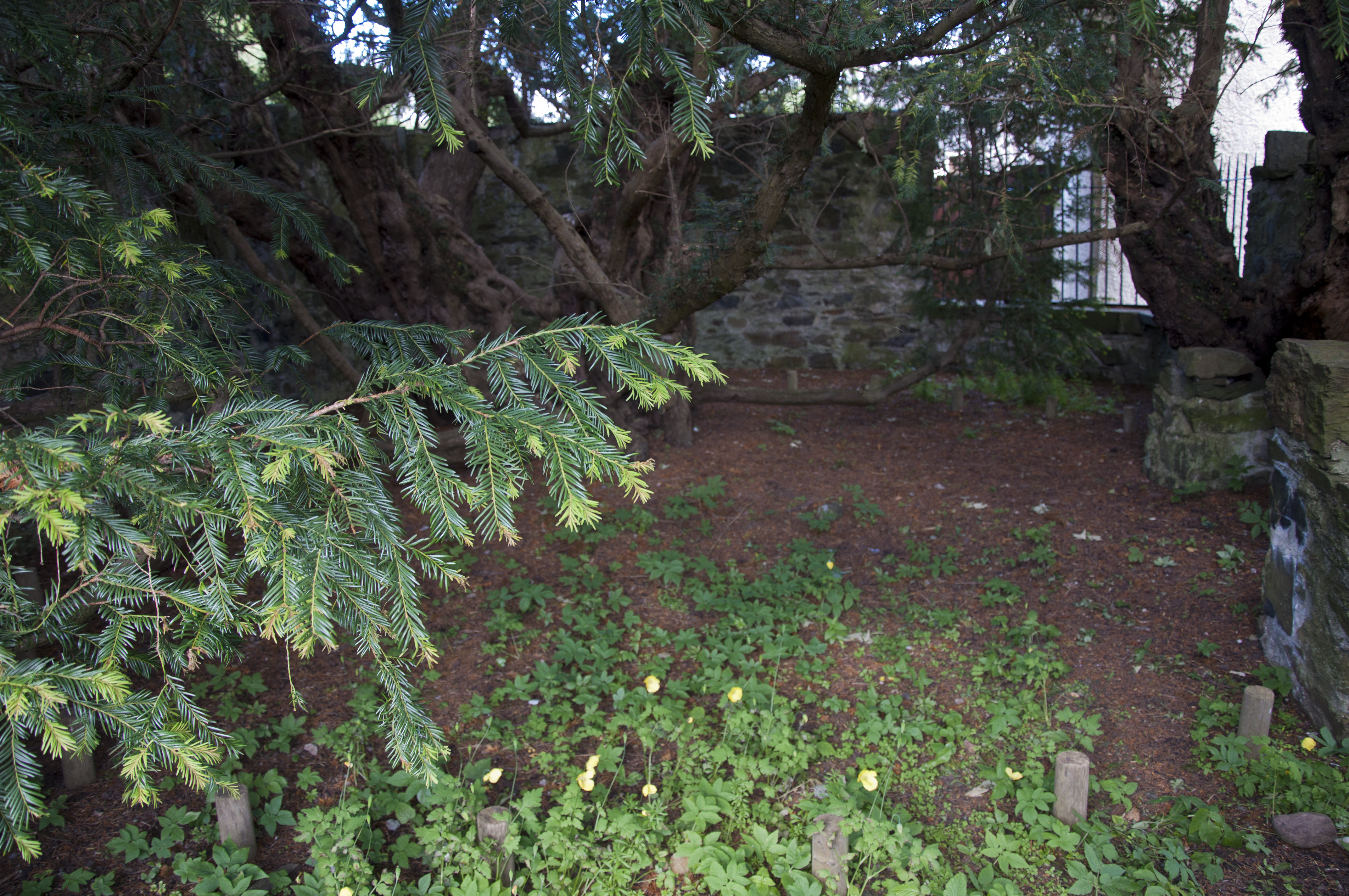 De venijnboom in Fortingall, Schotland